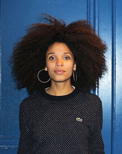 Stéfi Celma en 2015